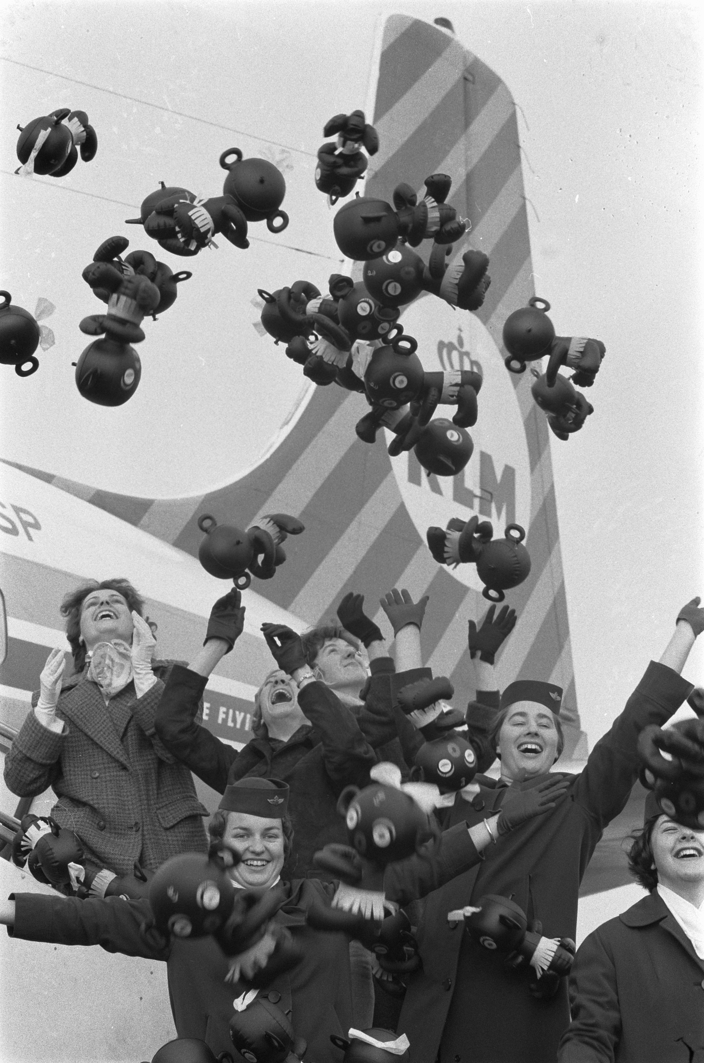 Collectie / Archief : Fotocollectie Anefo Reportage / Serie : [ onbekend ] Beschrijving : Nieuwe rage na de hoela hoep , "winkydoll", de winkydolllanding Datum : 9 november 1960 Fotograaf : Pot, Harry / Anefo Auteursrechthebbende : Nationaal Archief Materiaalsoort : Negatief (zwart/wit) Nummer archiefinventaris : bekijk toegang 2.24.01.05 Bestanddeelnummer : 911-7501